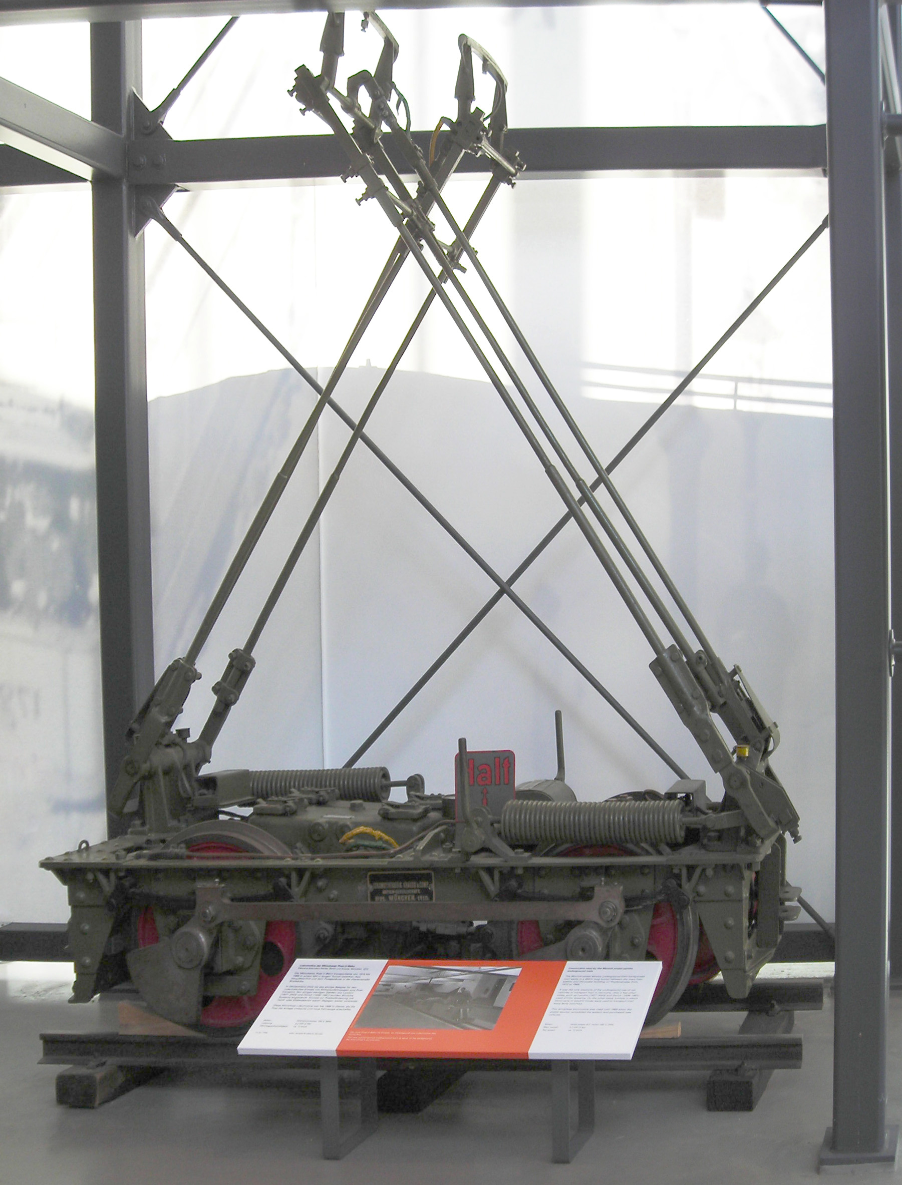 Lokomotive der Münchner Post-U-Bahn, 1910 gebaut von den Siemens-Schuckert-Werken (Berlin) und Kraus (München). Die führerlose Elektrolok (Drehstrom 155 V, 50 Hz, Leistung 2,2 kW, Höchstgeschwindigkeit 12 km/h), wurde von 1910 bis 1966 für Deutschlands einzige Post-U-Bahn verwendet. Der Tunnel führte vom Hauptbahnhof München bis zur 450 Meter entfernten sogenannten Hopfenpost (Postamt München 2) in der Hopfenstraße (Maxvorstadt) und retour. Im Jahr 1988 wurde der Betrieb eingestellt. Ähnliche Systeme gab es in London (1927-2004) und Zürich (1938-1981). Exponat im Deutschen Museum Verkehrszentrum, Halle I (Inv.-Nr. 77068)